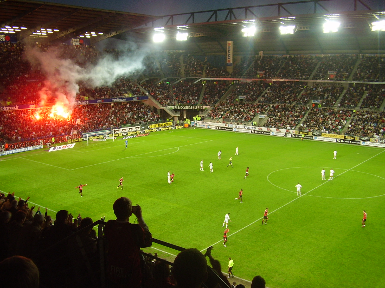 J37: Stade Rennais / Lorient (saison 2006/2007)